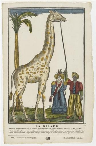 LA GIRAFE Kolorierter Druck 1. Hälfte 19. Jahrhundert Musée national des Arts et Traditions Populaires, Paris Inventarnummer 65.75.435 C